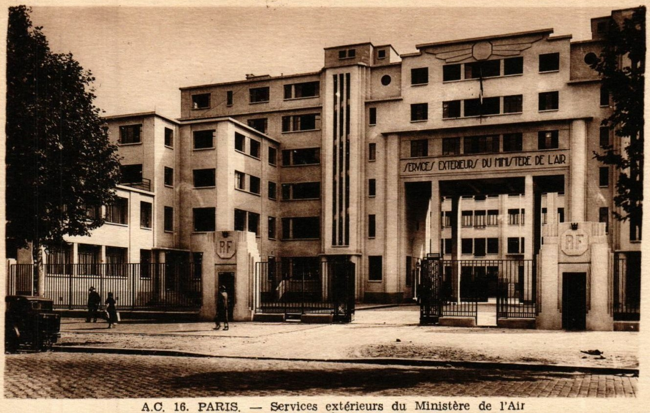 Le ministère de l'Air, boulevard Victor, vers les années 1930